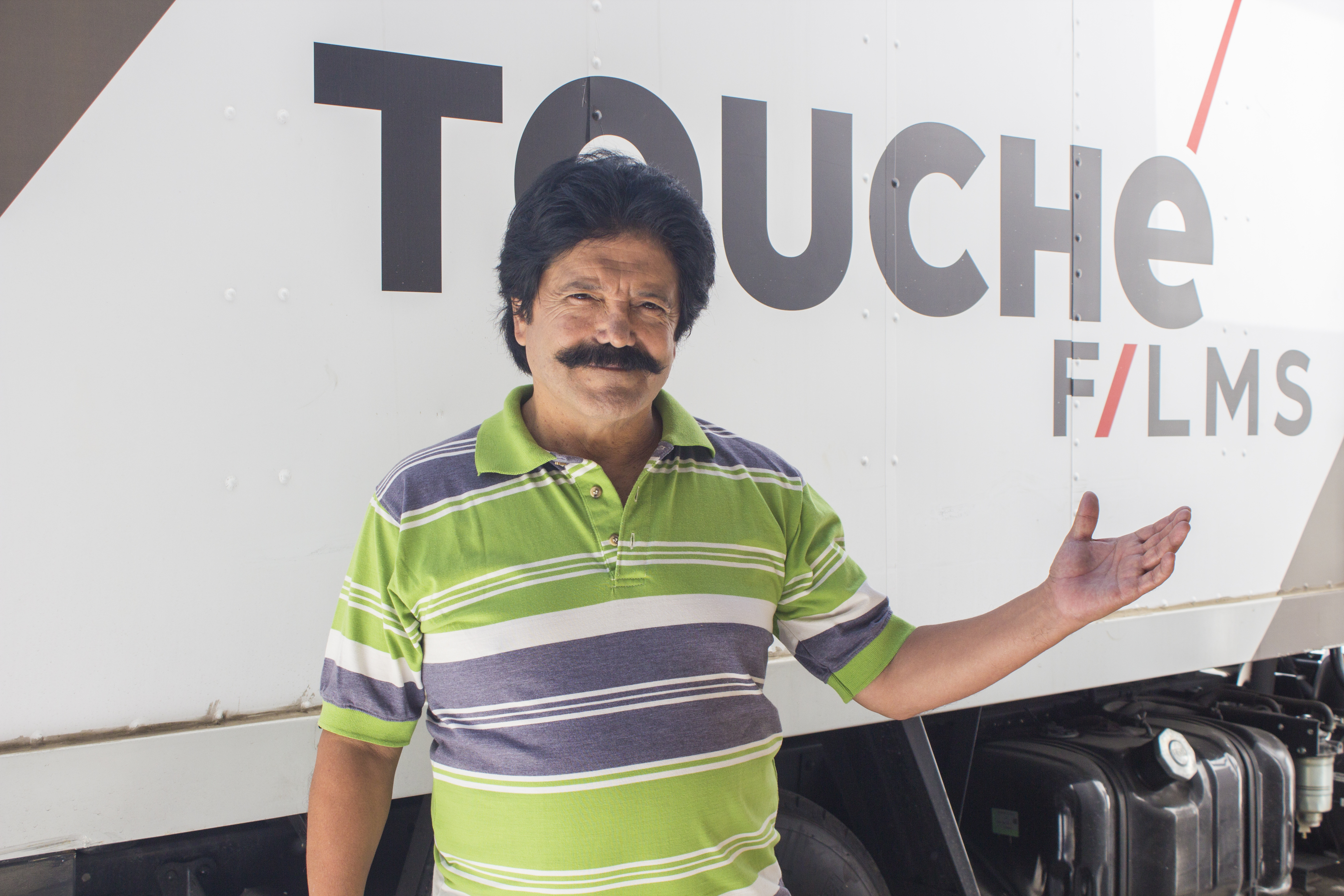 Mosquito Mosquera es un actor de teatro y televisión ecuatoriano, que también a trabajado para TouchéFilms con su producto Enchufe.tv.